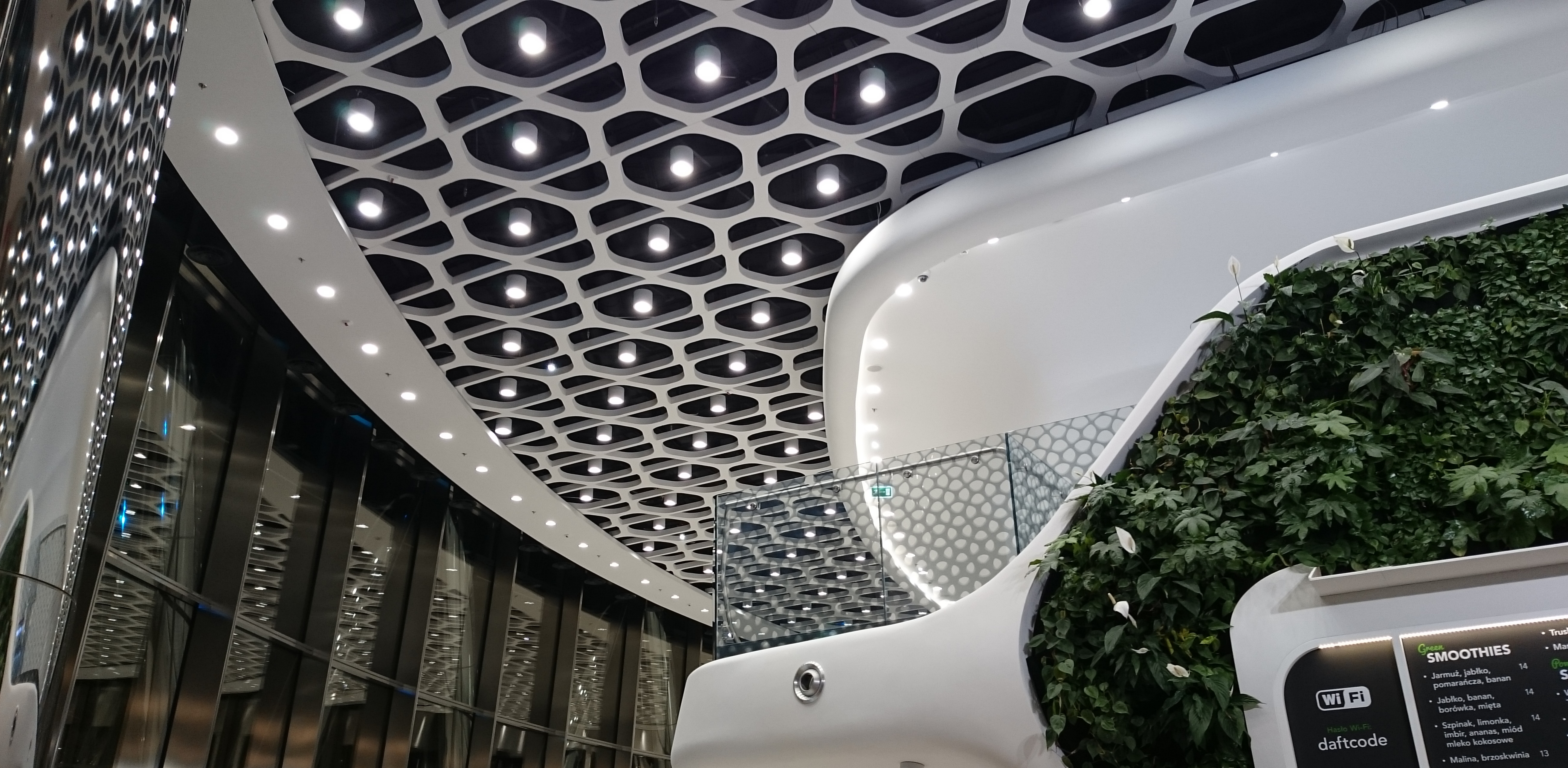 Wnętrze wieżowca Warsaw Spire podczas Nocy Muzeów 2016